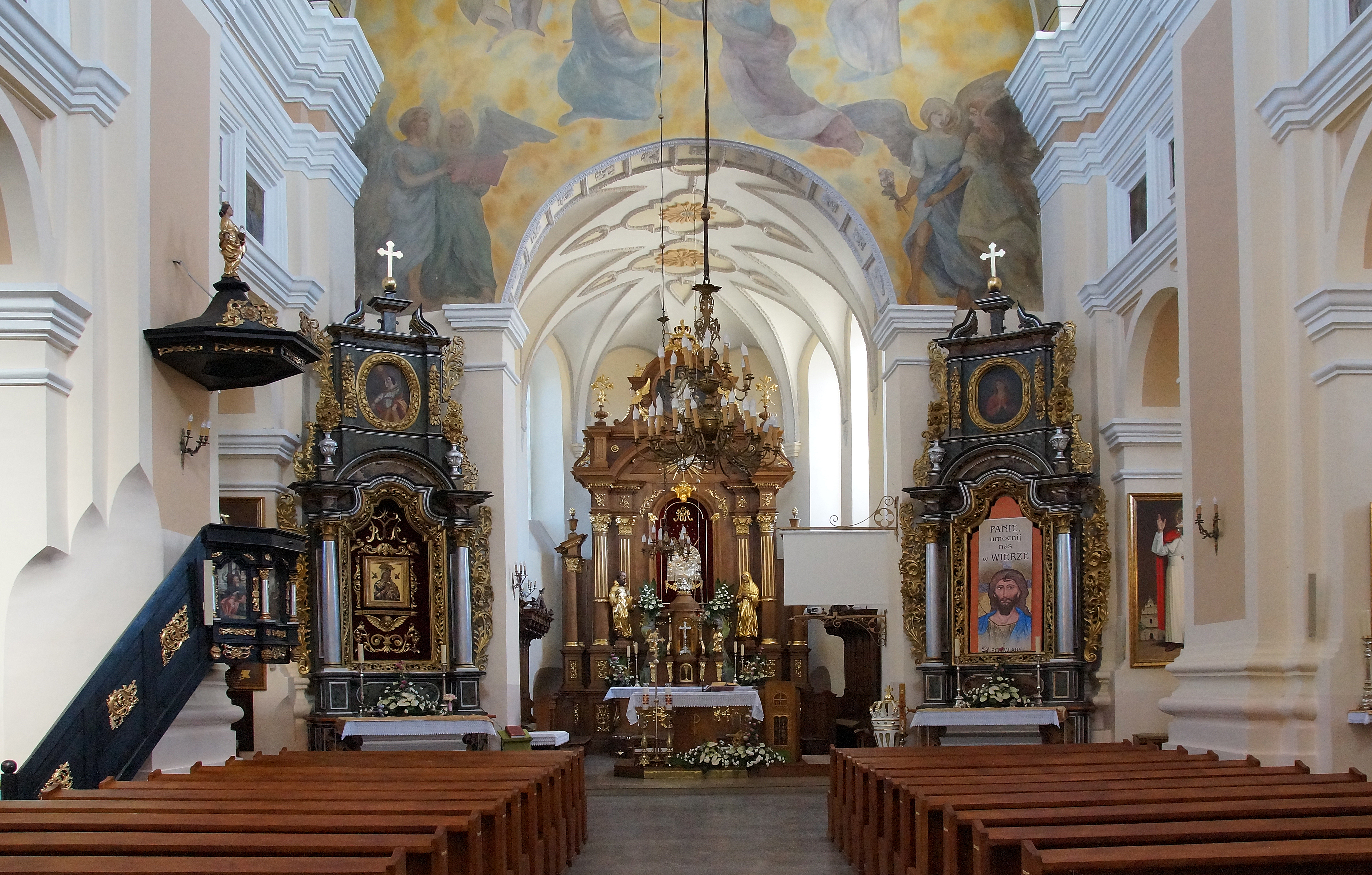 Lublin, kościół św. Agnieszki, 1646-1647, 1685-1698, 1831